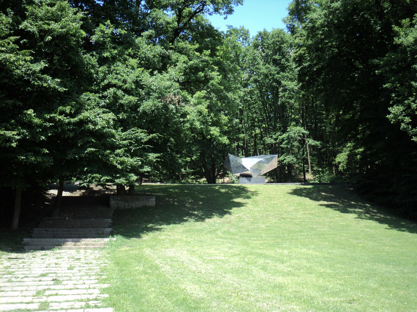 Prilaz spomen-parku Dotršćina u Zagrebu. Self-made. Jun 2011.